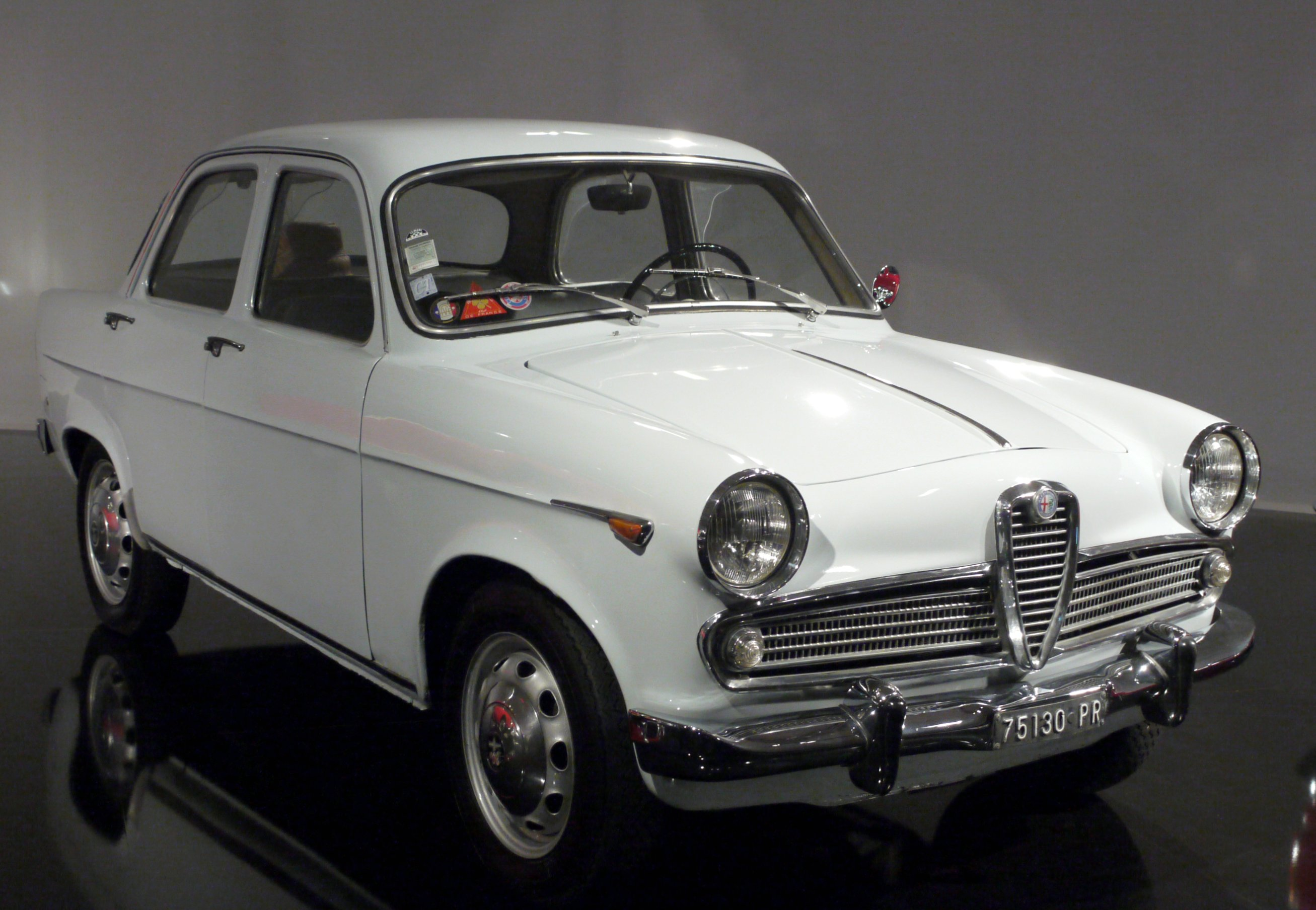 1955-1962 Alfa-Romeo Giulietta Berlina.